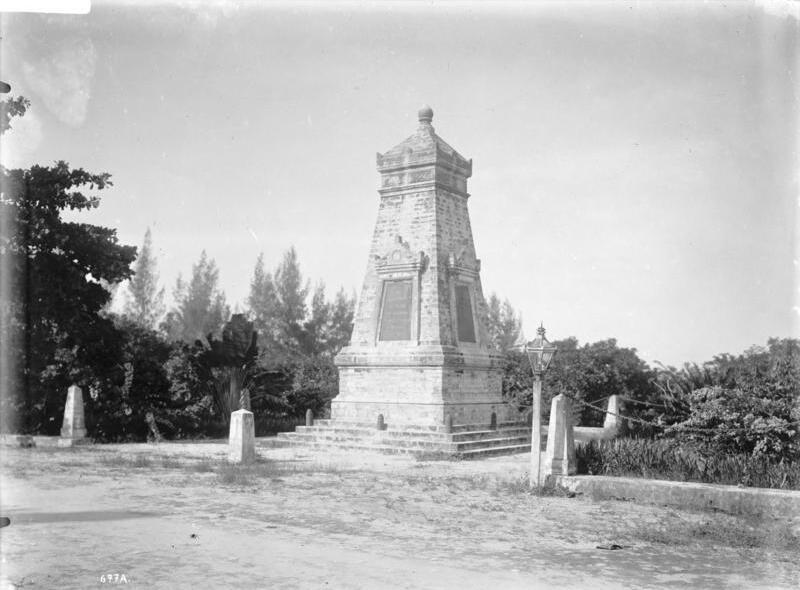 Bagamojo, Wissmann-Denkmal